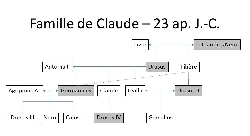 Généalogie simplifiée de la famille Julio-claudienne en 23 ap. J.-C. ; Un vieillard, Tibère, un seul adulte, Claude, des enfants et des mères ambitieuses